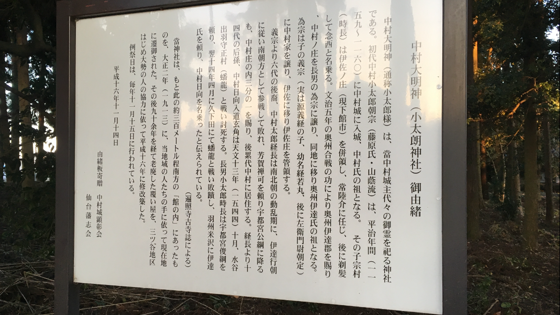 中村大明神御由緒